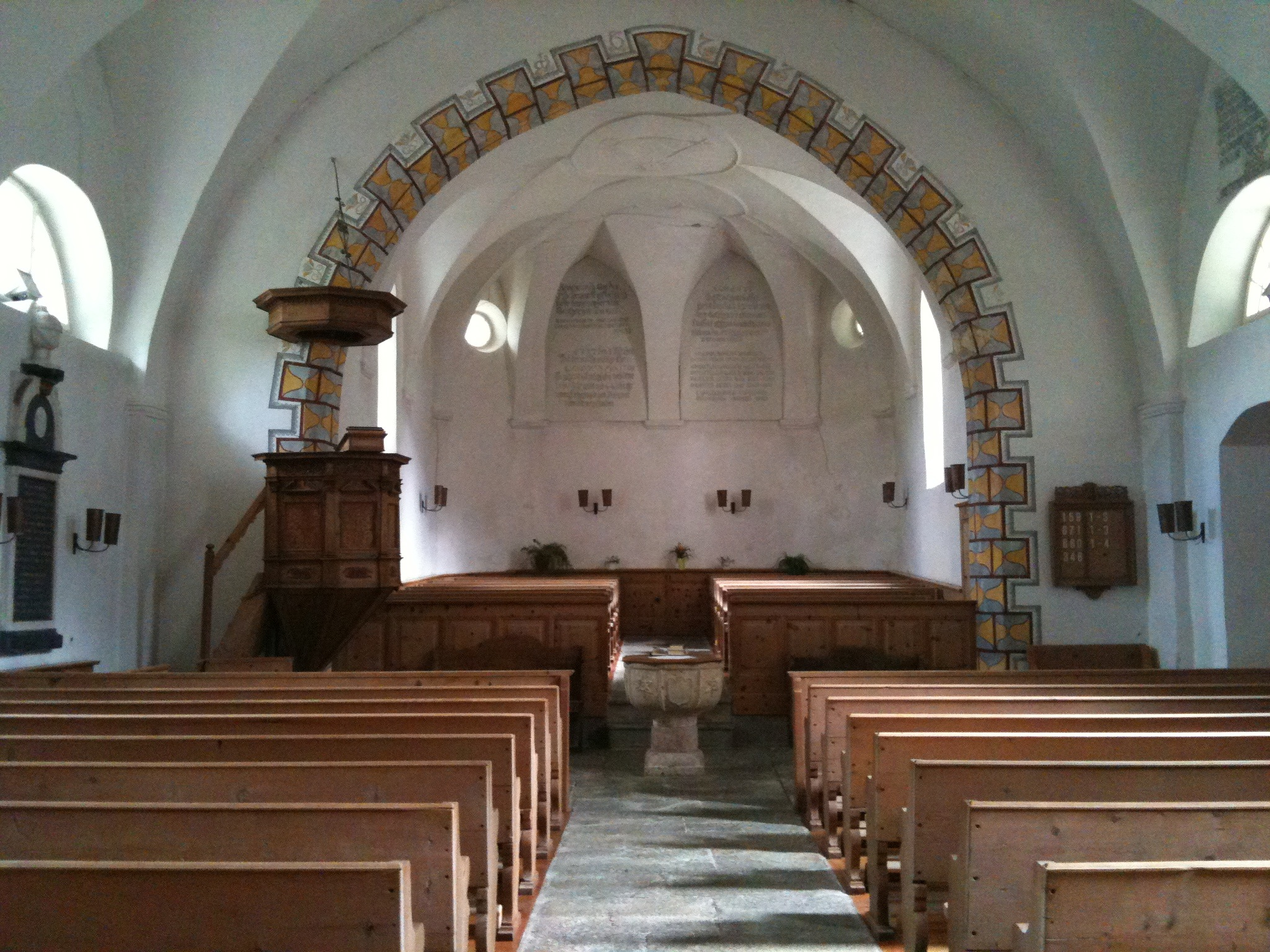 reformierte Kirche Andeer (Kanton Graubünden)